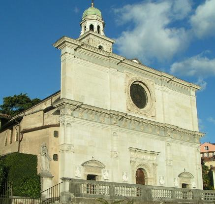 Facciata della Cattedrale di San Lorenzo (Lugano) foto scattata dell'utente Elvezio